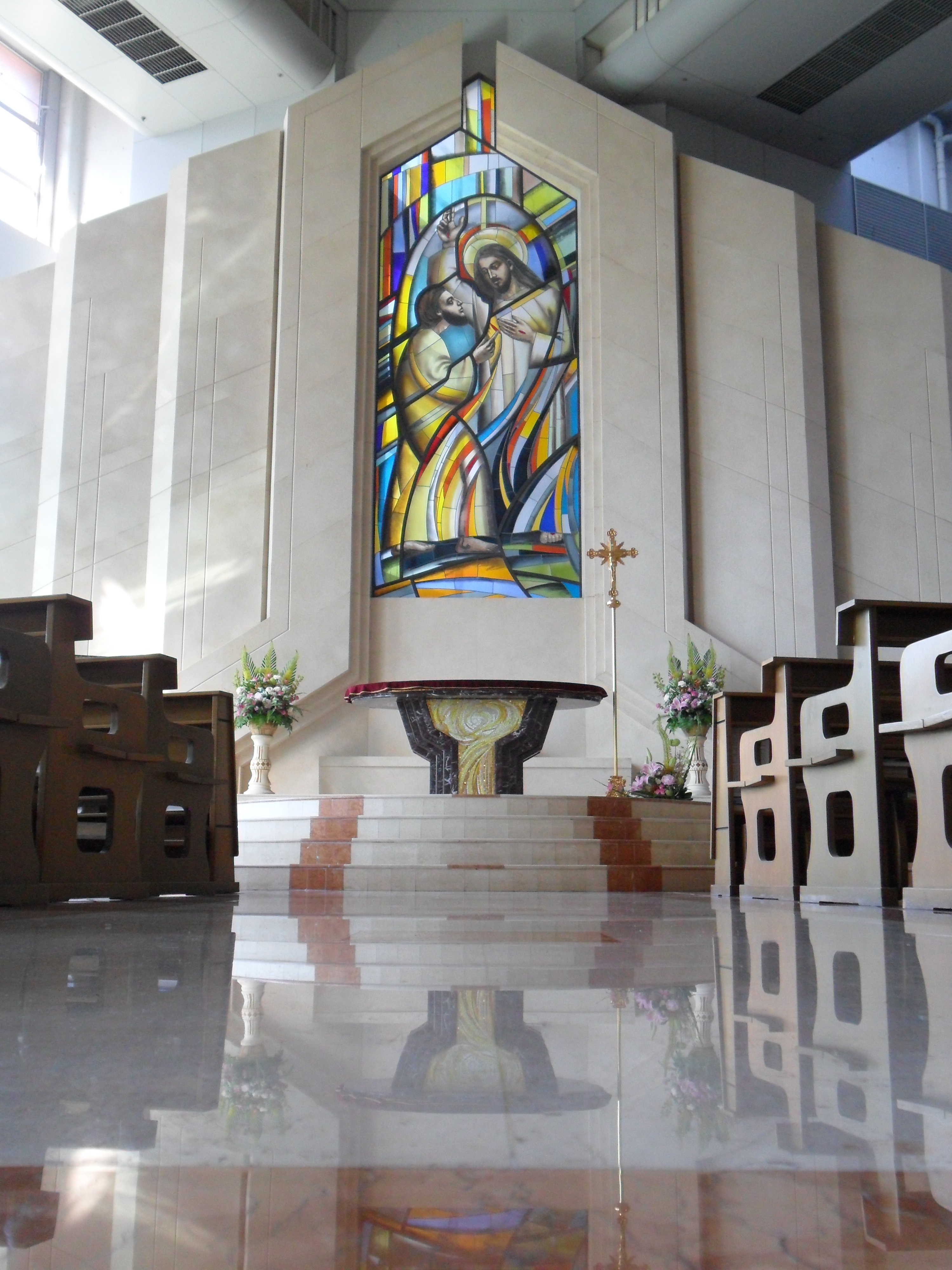 中文（香港）: 聖多默宗徒堂內貌, 香港, 中國